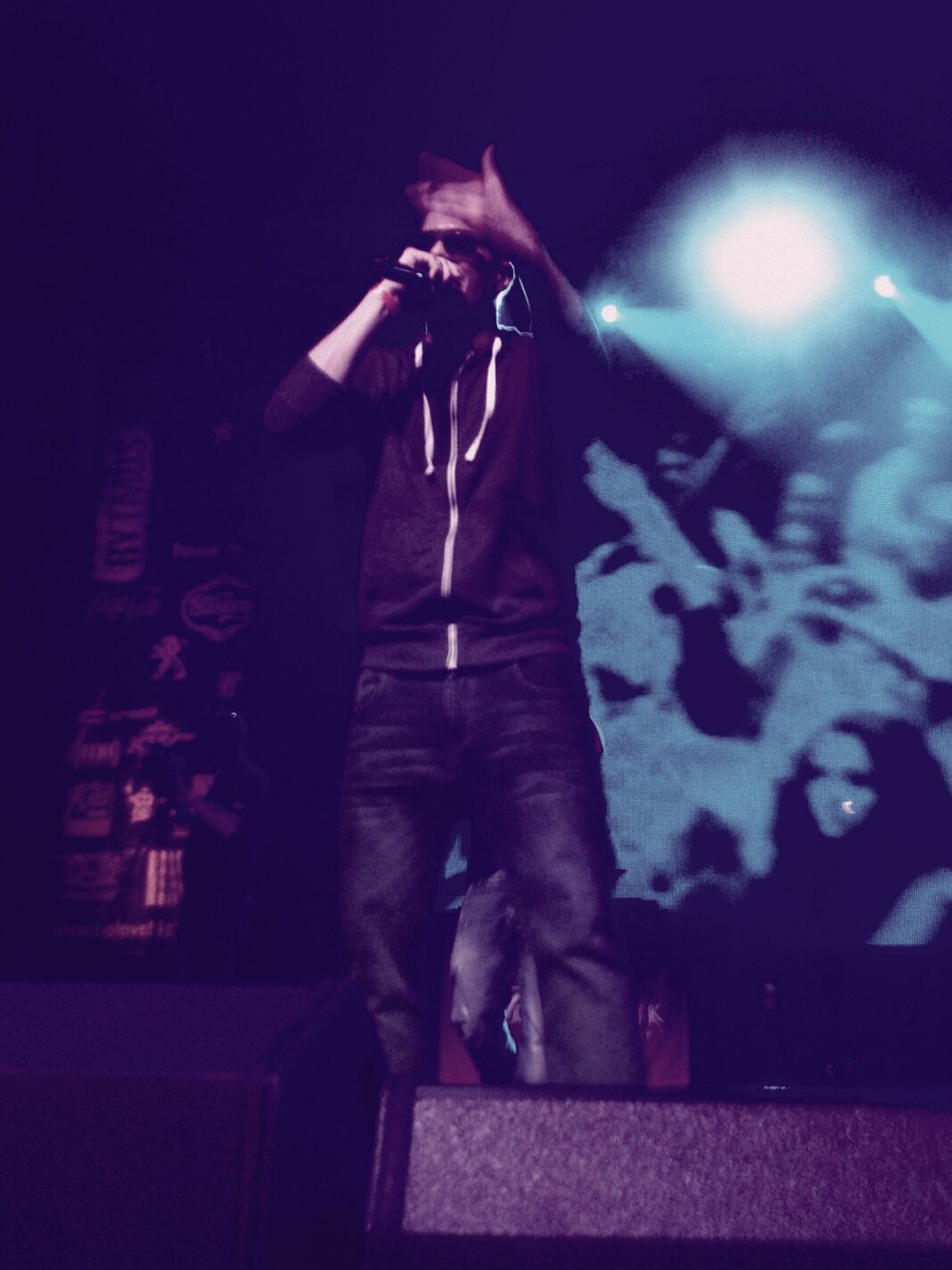 Ektor